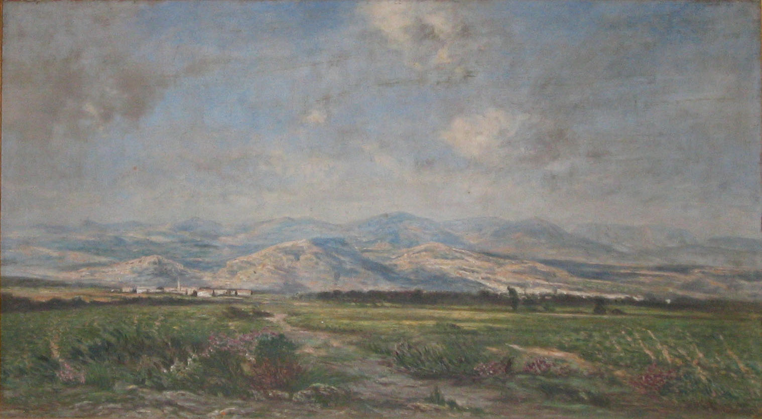 Paysage pres de Narbonne